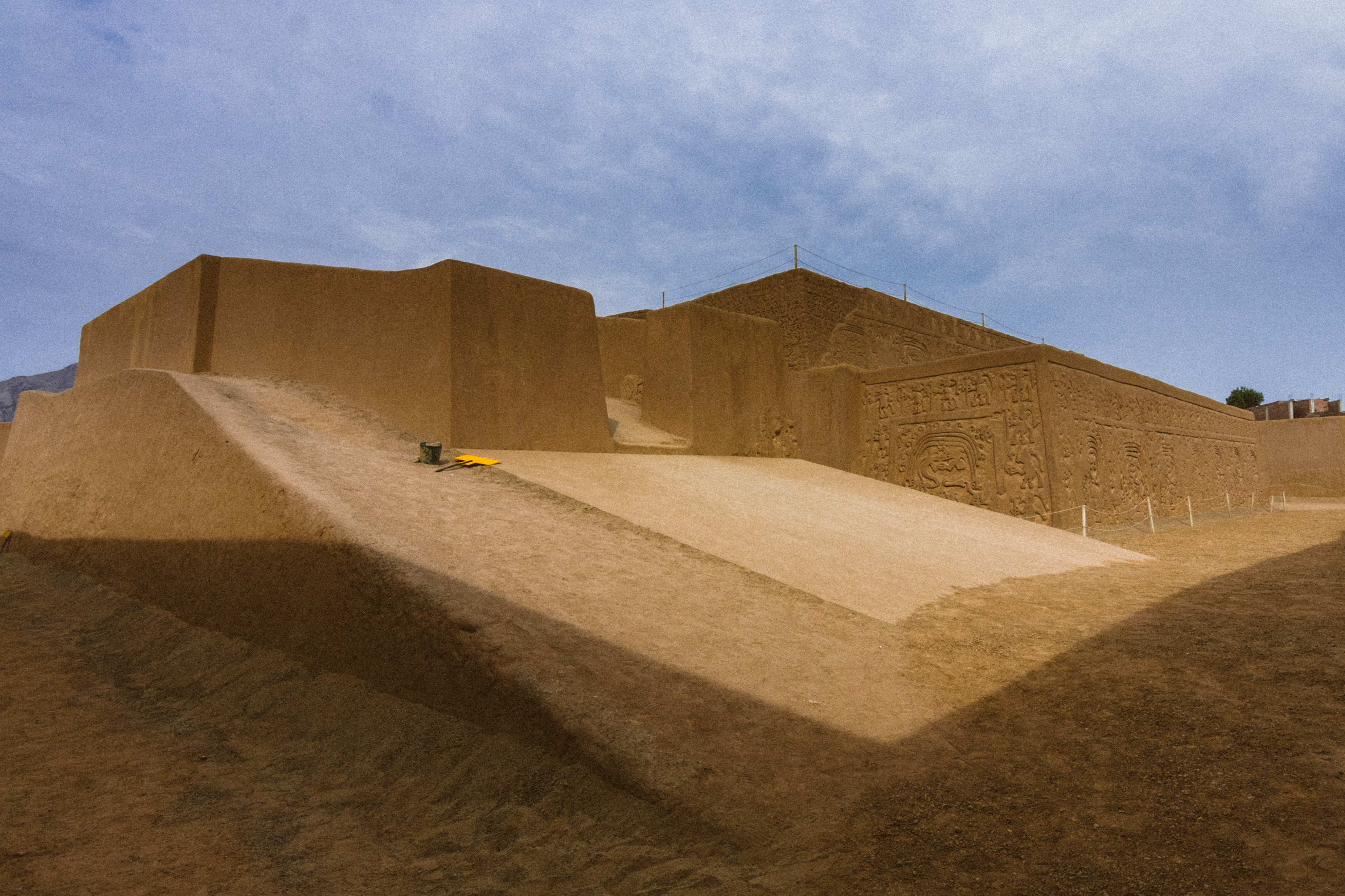 Vista lateral de la rampa de acceso a la Huaca del Dragón (Huaca Arcoíris) en La Esperanza, La Libertad, Perú